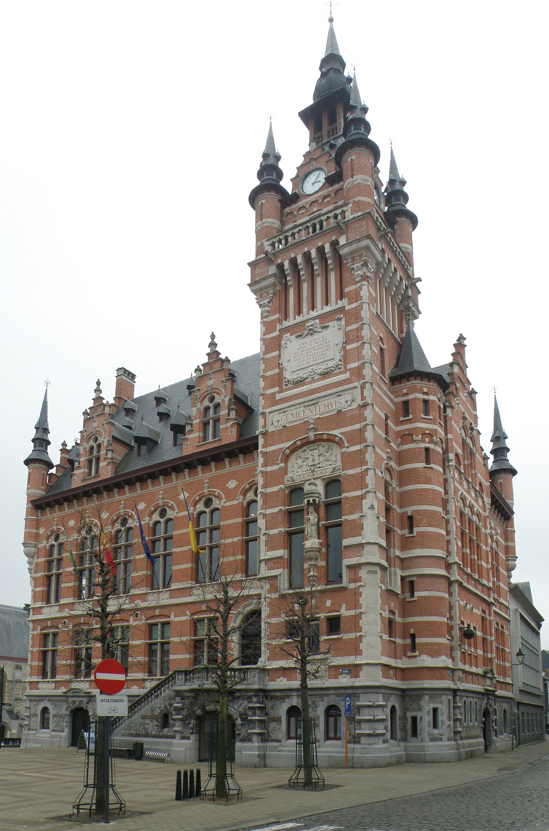 Temse (prov. Oost-Vlaanderen, België). Gemeentehuis.